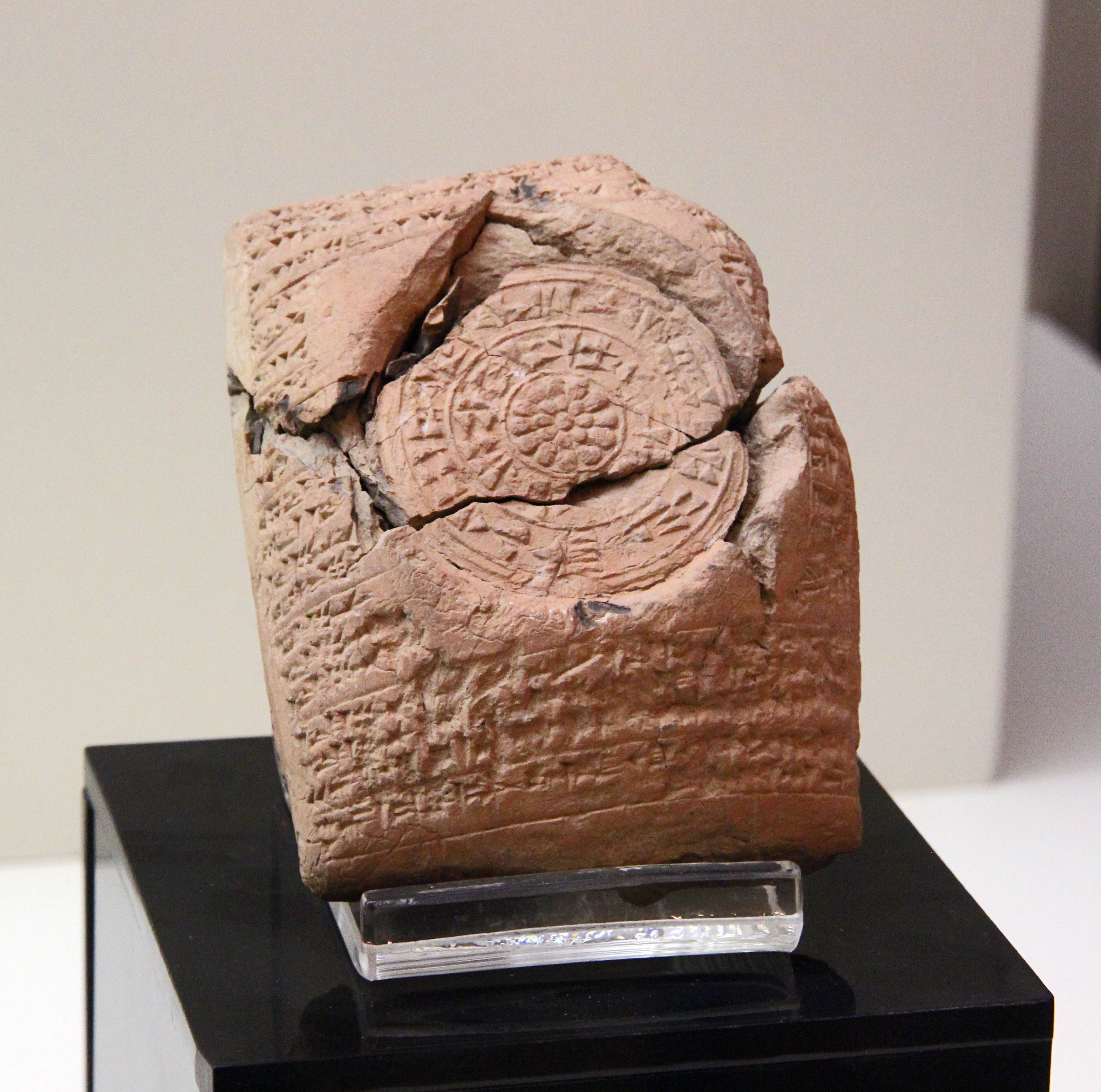 Ḫattuša, Hauptstadt der Hethiter, Museum Boğazkale, Zentraltürkei